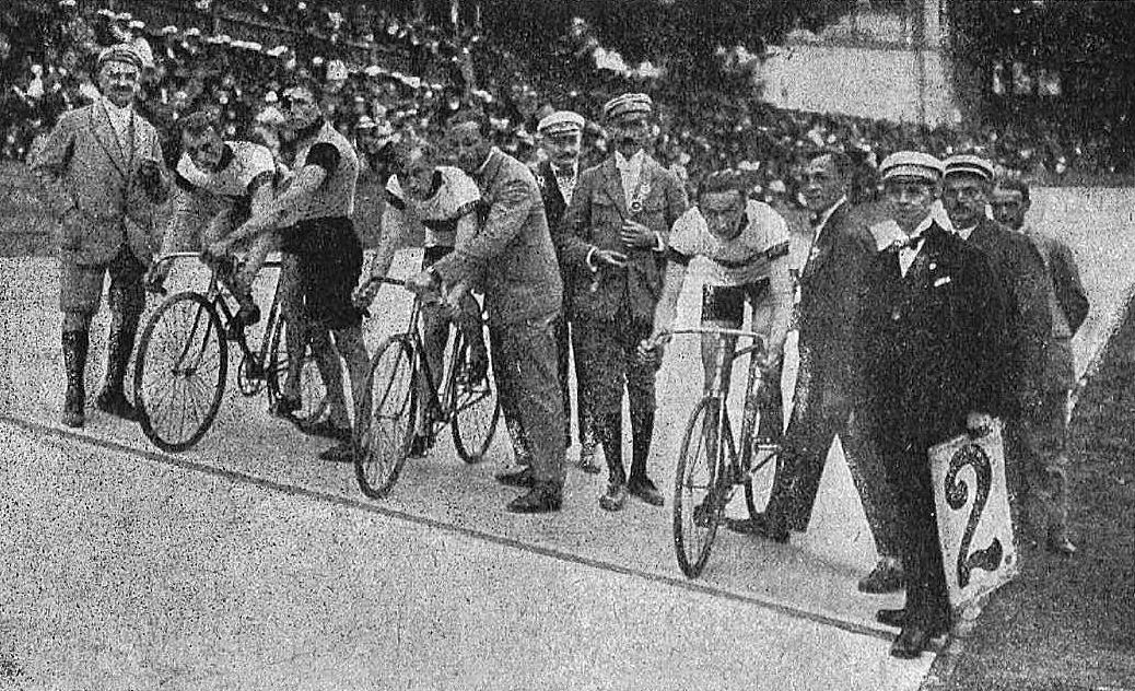 Iko, Józef Lange, Stankiewicz przed startem finału mistrzostw Polski 1923